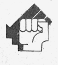 Logo parti politique